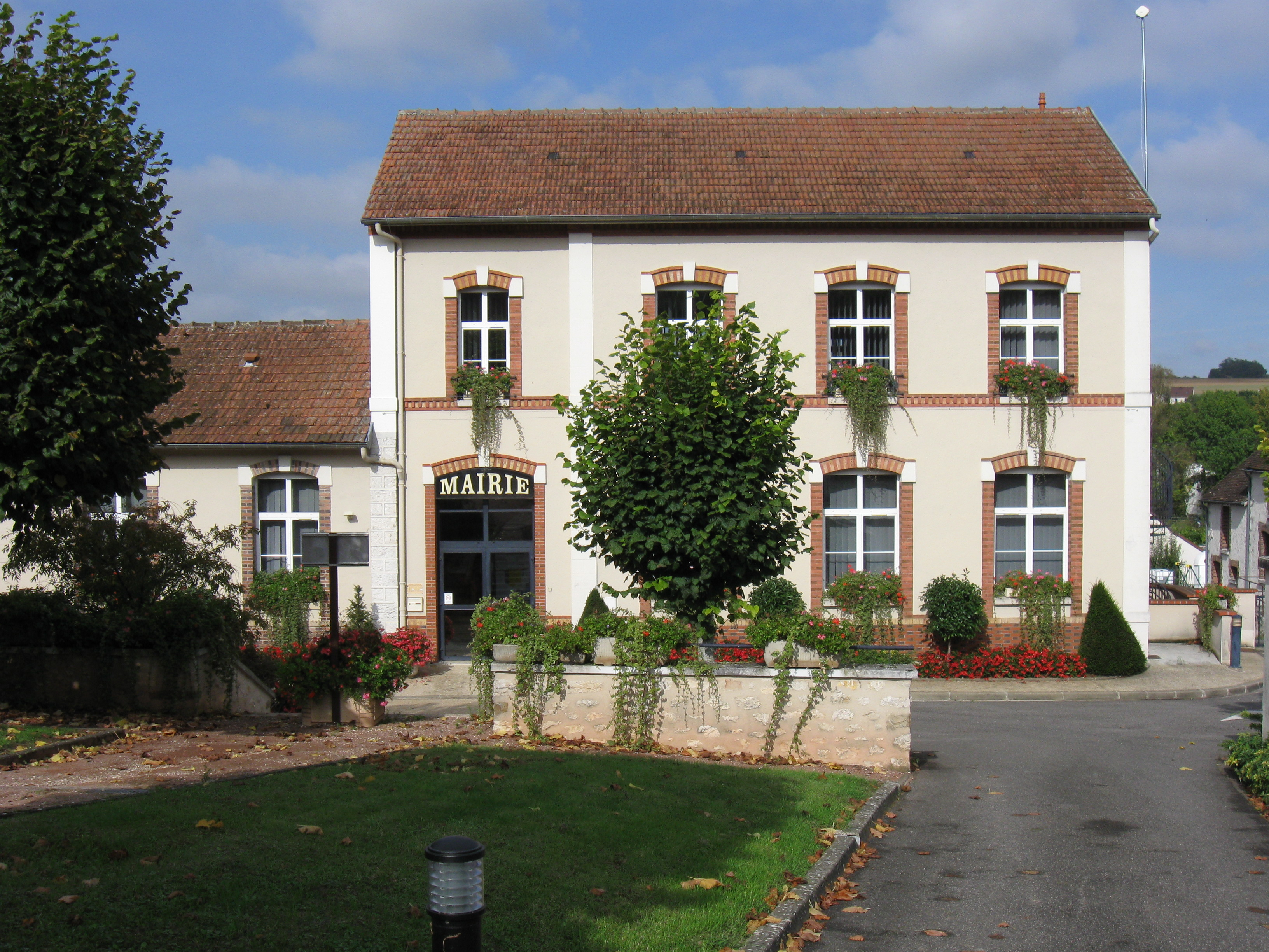 Mairie de Sainte-Colombe (département de la Seine et Marne, région Île-de-France).